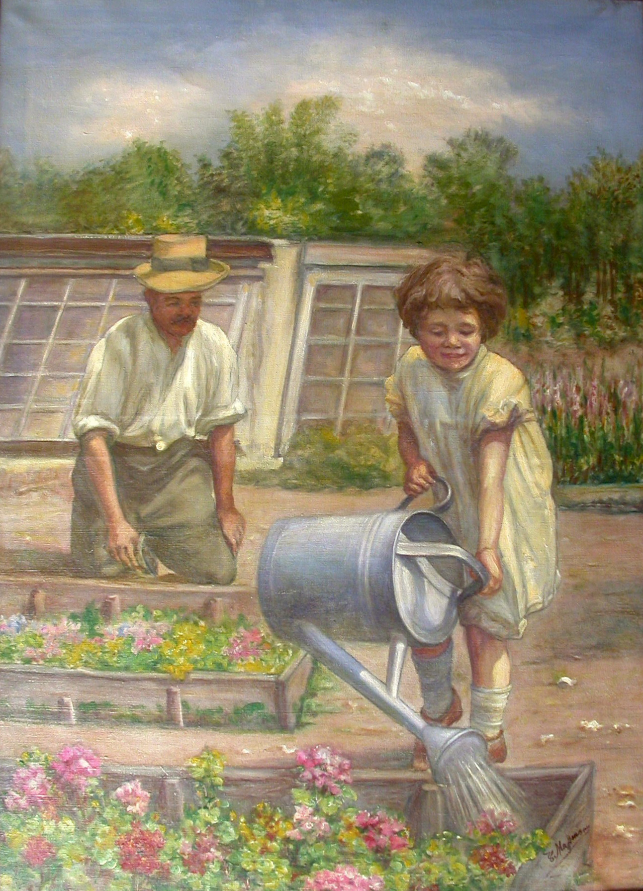 Bei der Gartenarbeit.